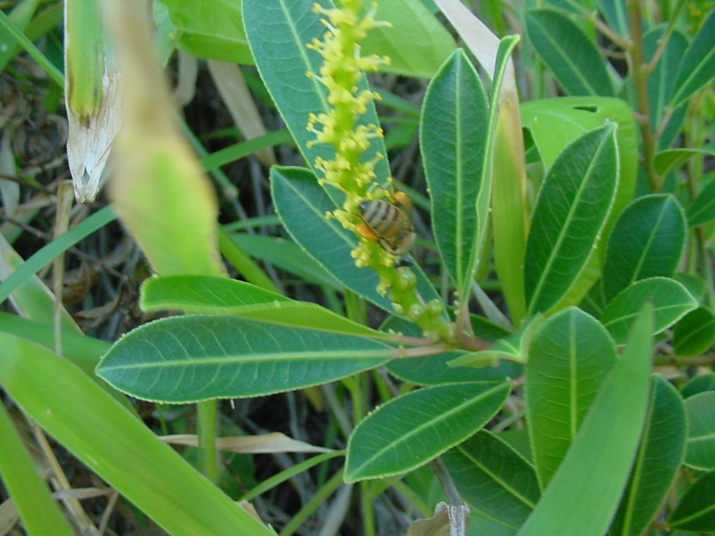 Sapium glandulatum - EUPHORBIACEAE Imbituba - SC - Brasil